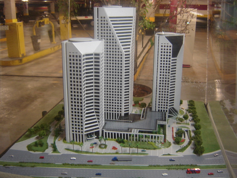 Maquete do Centro Empresarial Nações Unidas em São Paulo